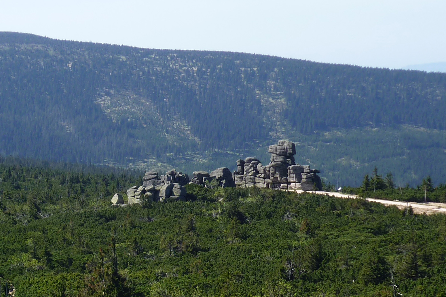 Blick von der Reifträgerbaude (Szrenica) im Riesengebirge